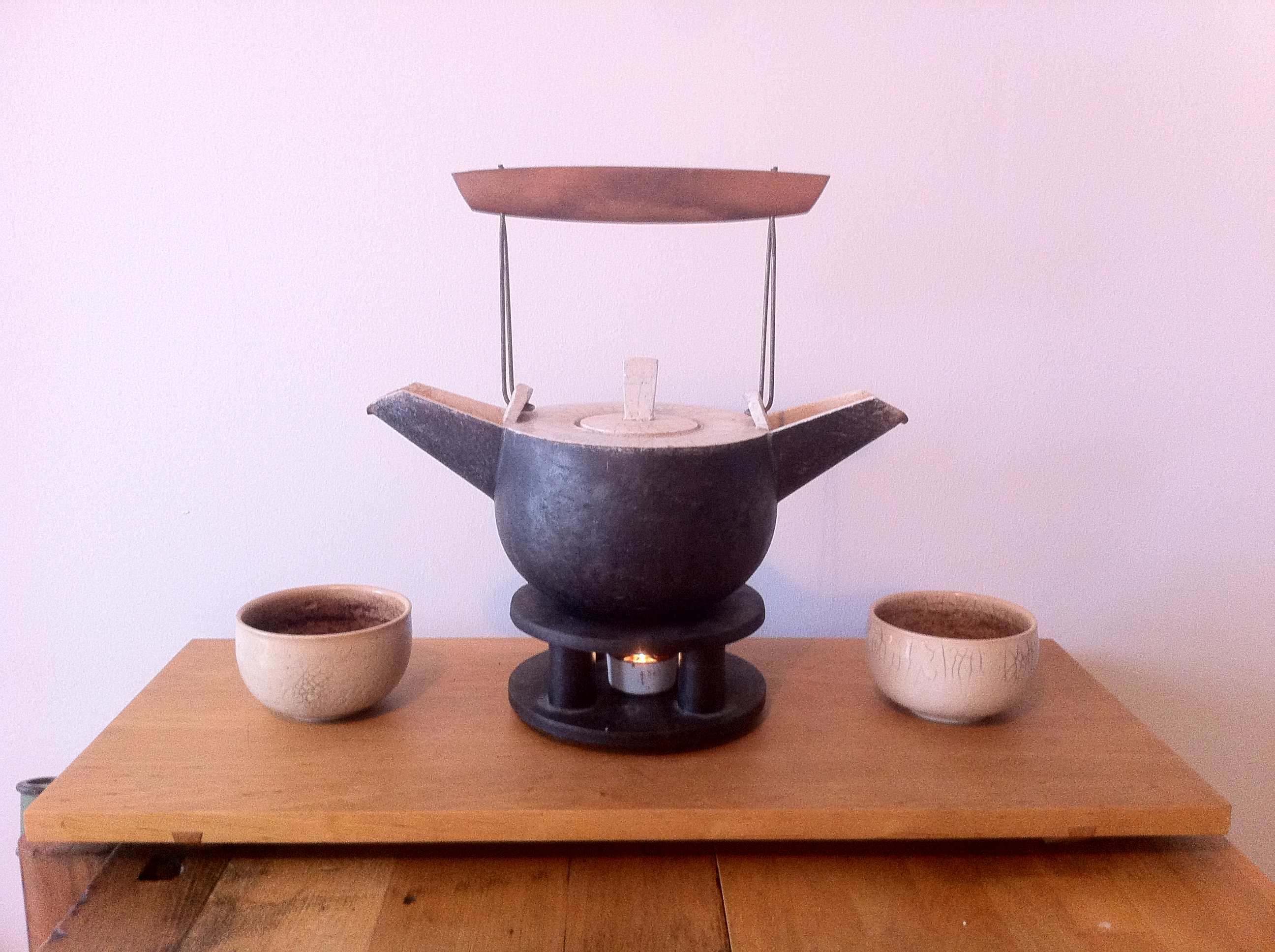 Teeservice, Joachim Lambrecht, 2005